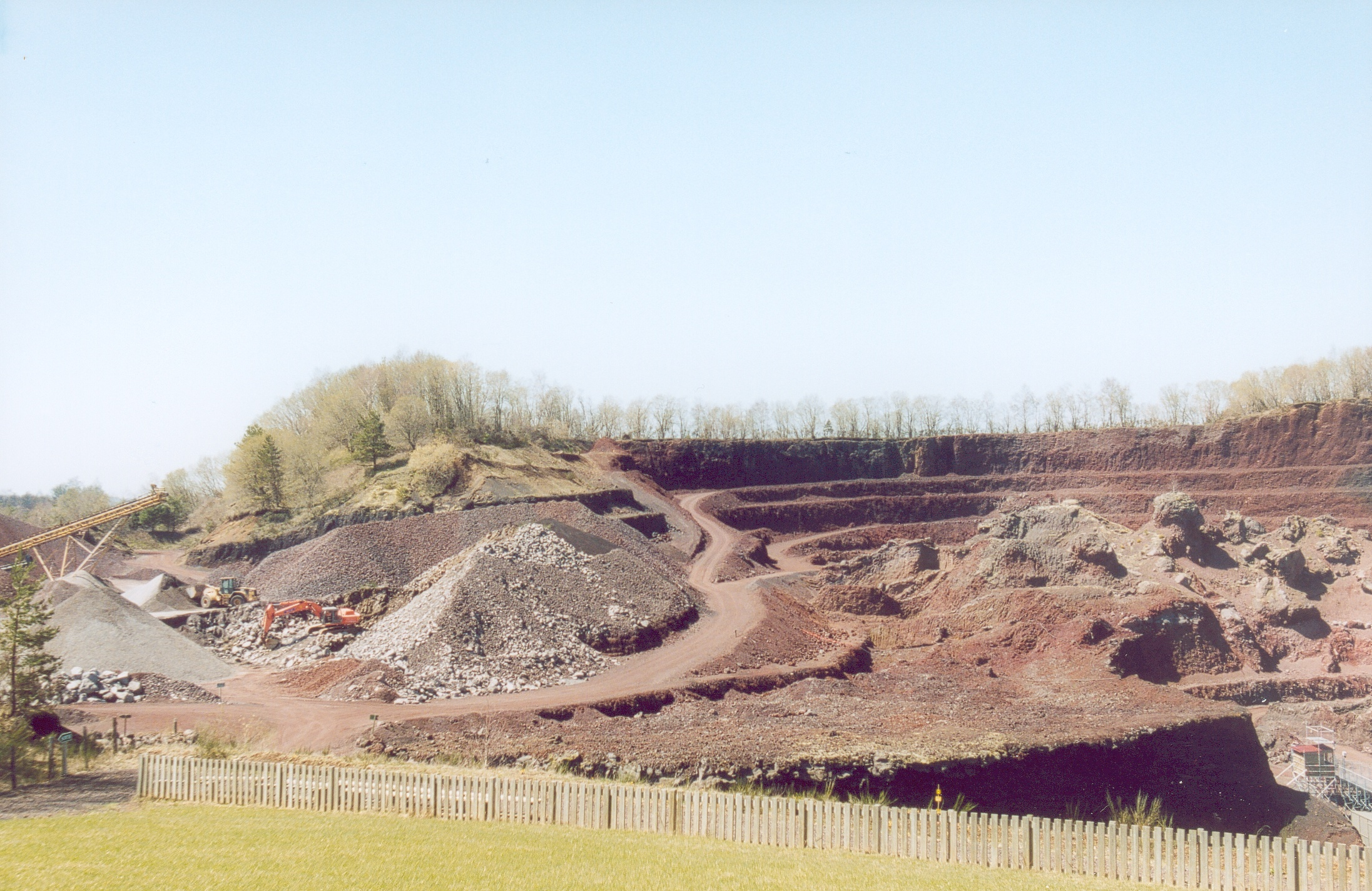 Le puy de Lemptégy Puy-de-Dôme France Photographie prise par Victor Darfeuille